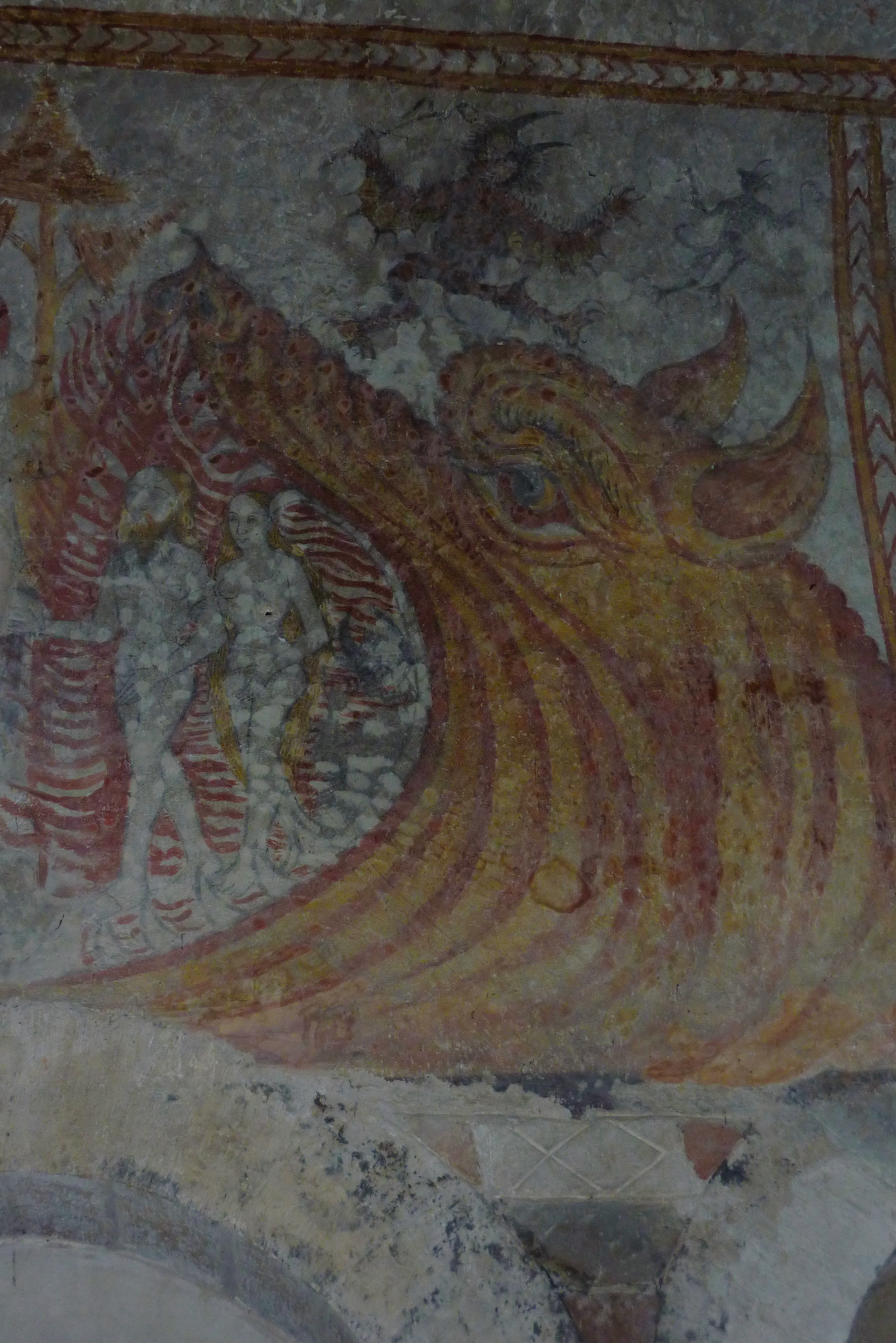 katholische Kirche Saint-Maurice in Saint-Maurice-de-Gourdans